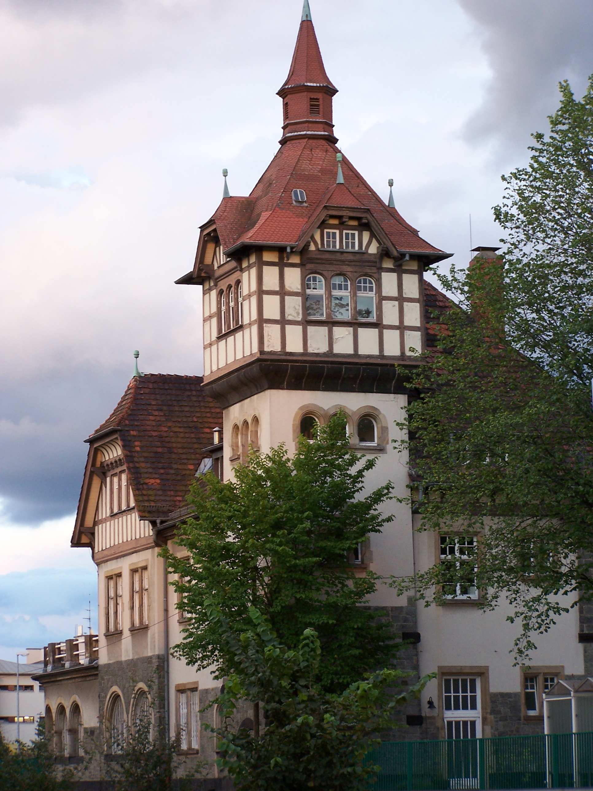 Frankfurt-Schwanheim, historisierendes Turmgebäude mit Jugendstilelementen. Das Gebäude gehört zum Klärwerk Niederrad.